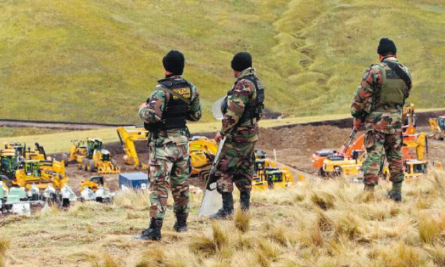 DINOES en Conga